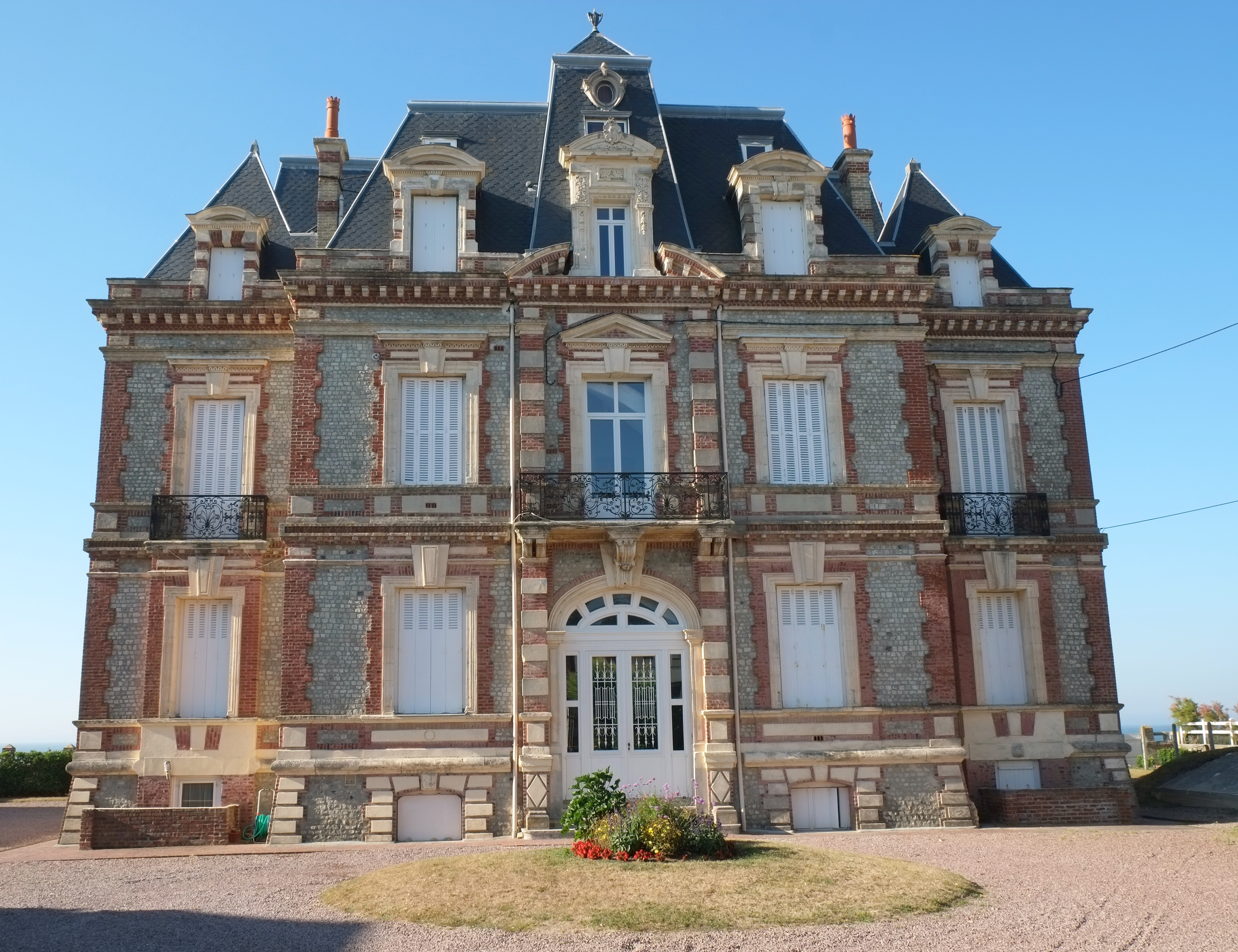 Villa Millet in Cabourg im Département Calvados (Frankreich), Nr. 40 avenue du Maréchal-Foch